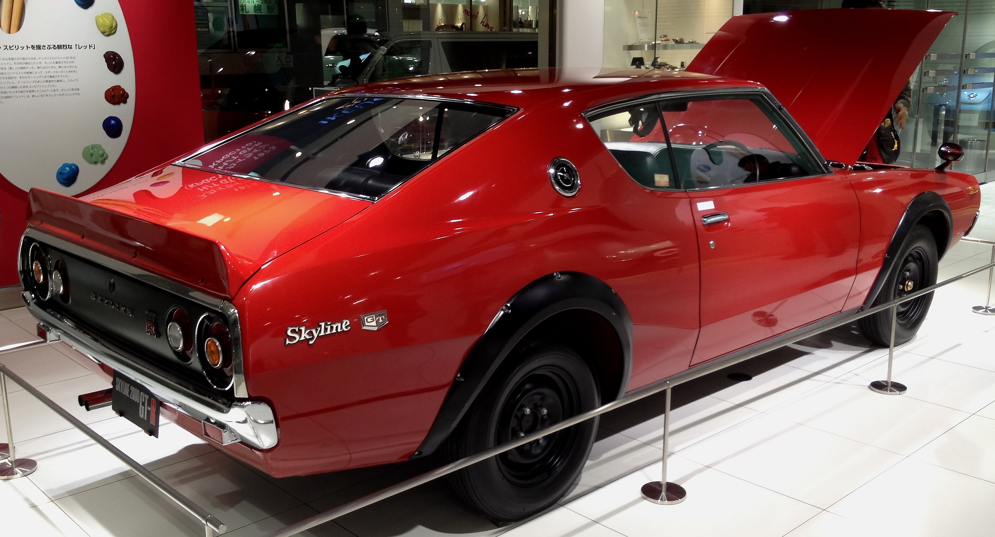 Skyline GT-R (KPGC110).